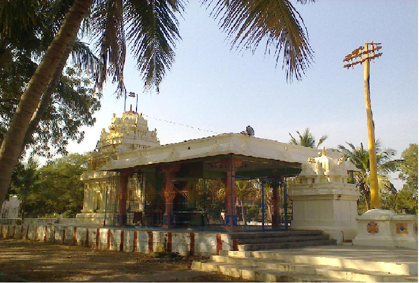 శ్రీసీతారామాలయం